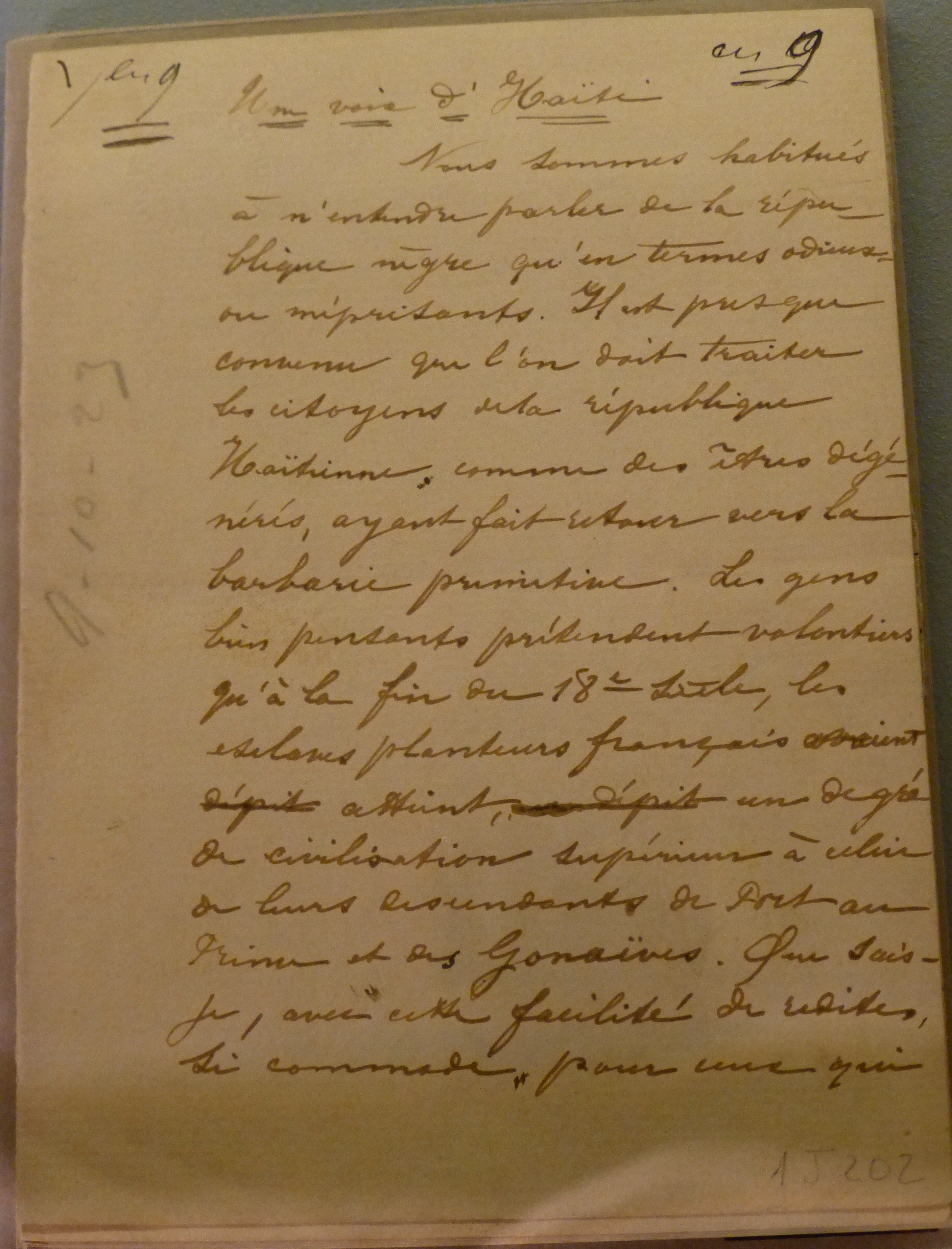 Bordeaux, Archives départementales de la Gironde, exposition Variations ː Élisée Reclus, 1905, manuscrit d'Une voix d’Haïti. In: La Revue , vol. 55, pp. 393-395.